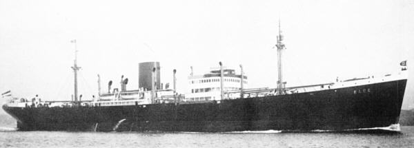 Der Schnellfrachter ELBE des NDL